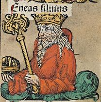 Enée Silvius, roi d'Albe-la-Longue, dans le livre de Hartmann Schedel, « La Chronique de Nuremberg », Bibliothèque Mondiale Numérique, 1493. Illustration par Wilhelm Pleydenwurff et Michael Wolgemut.